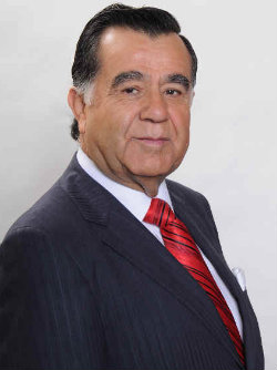 Sergio Ojeda Uribe